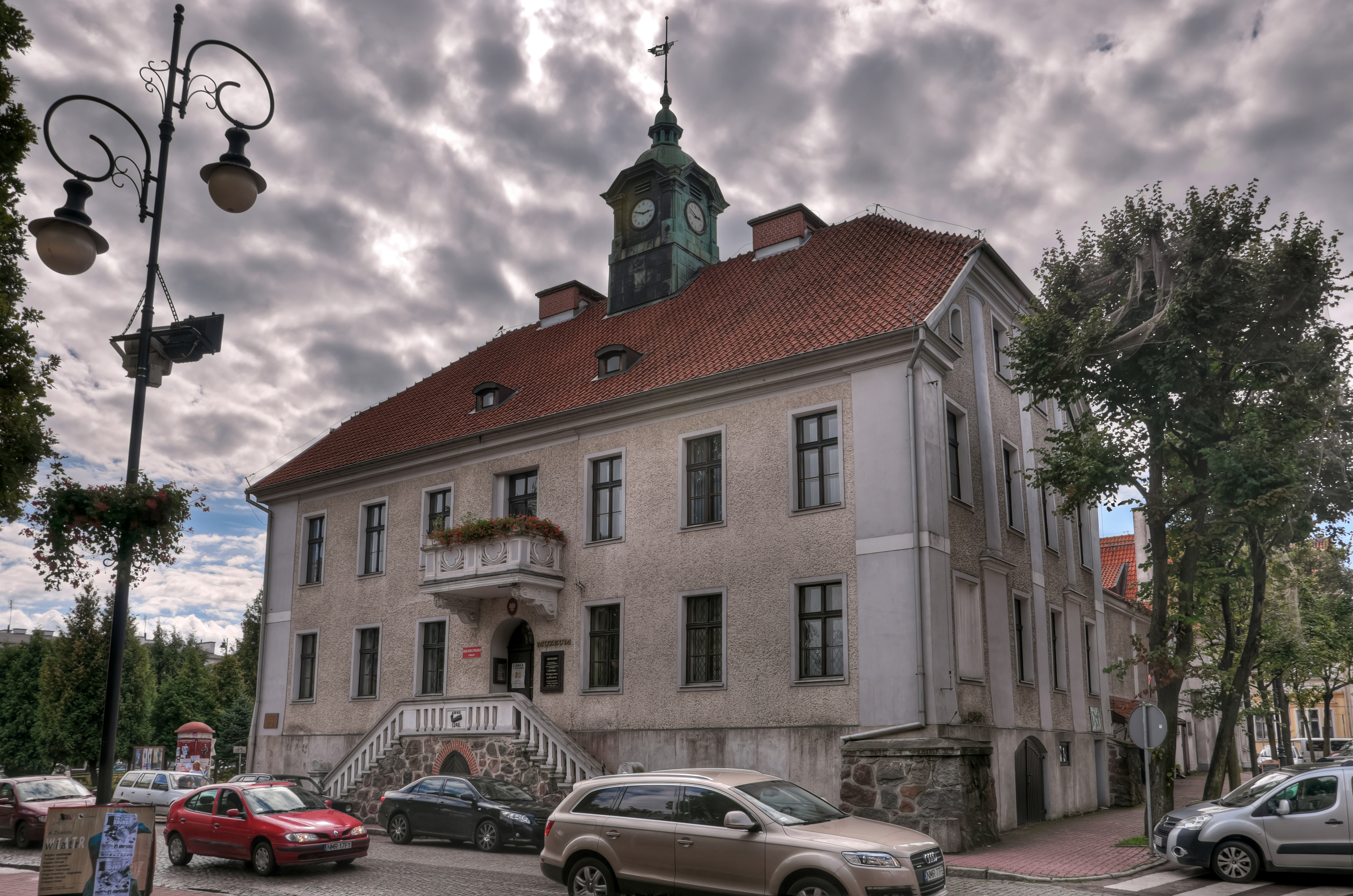 Ratusz w Mrągowie